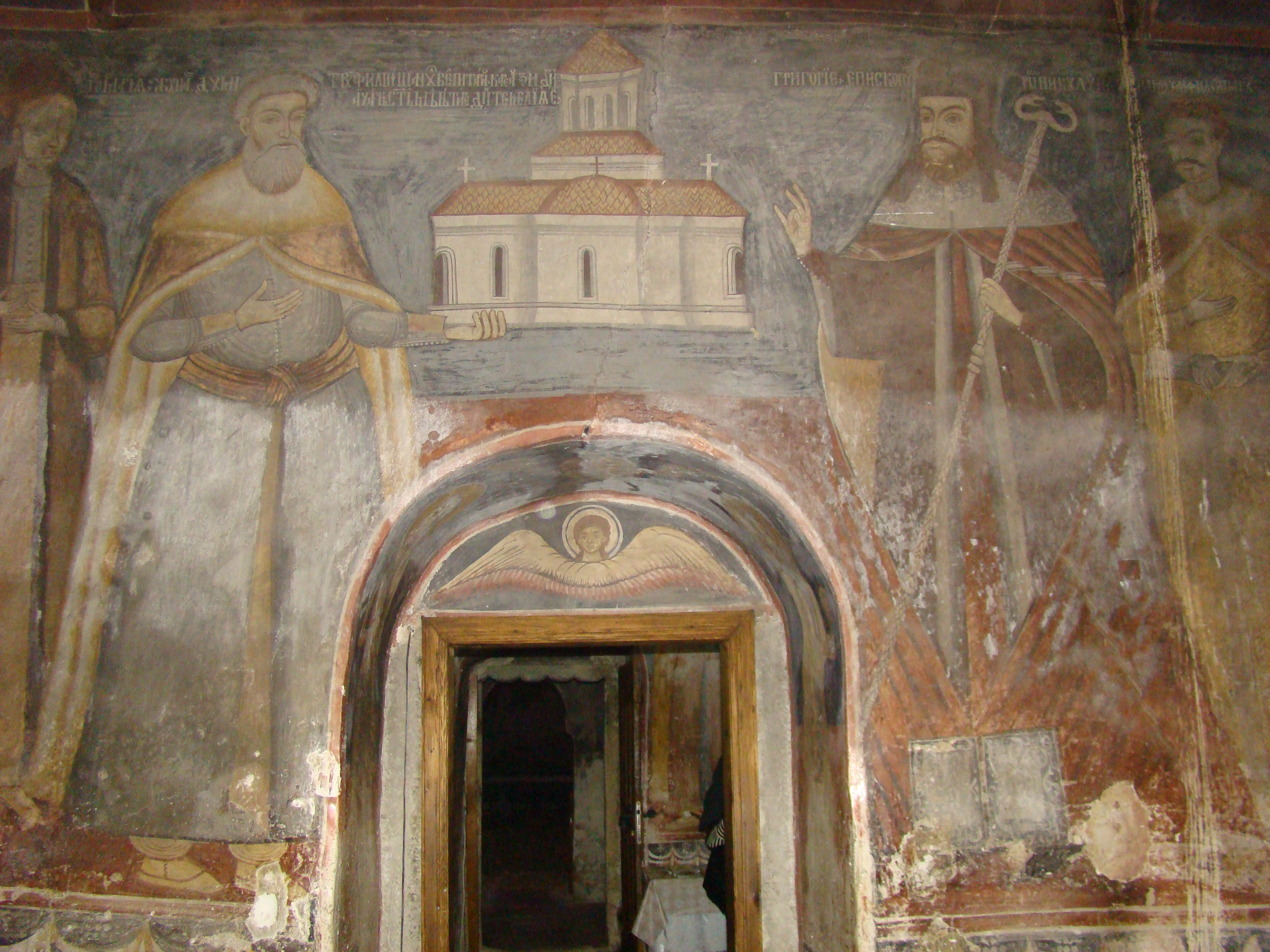 Ansamblul schitului Crasna, județul Gorj